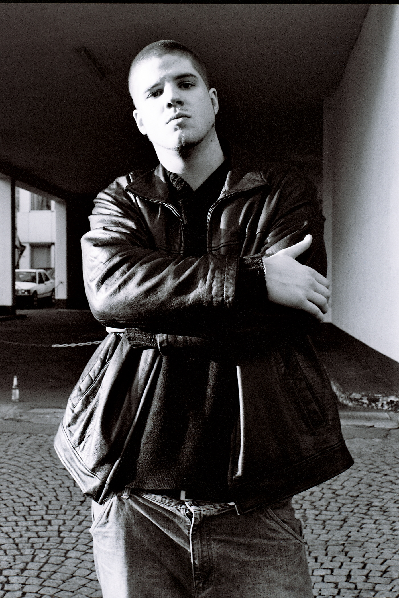 Rapper Tua